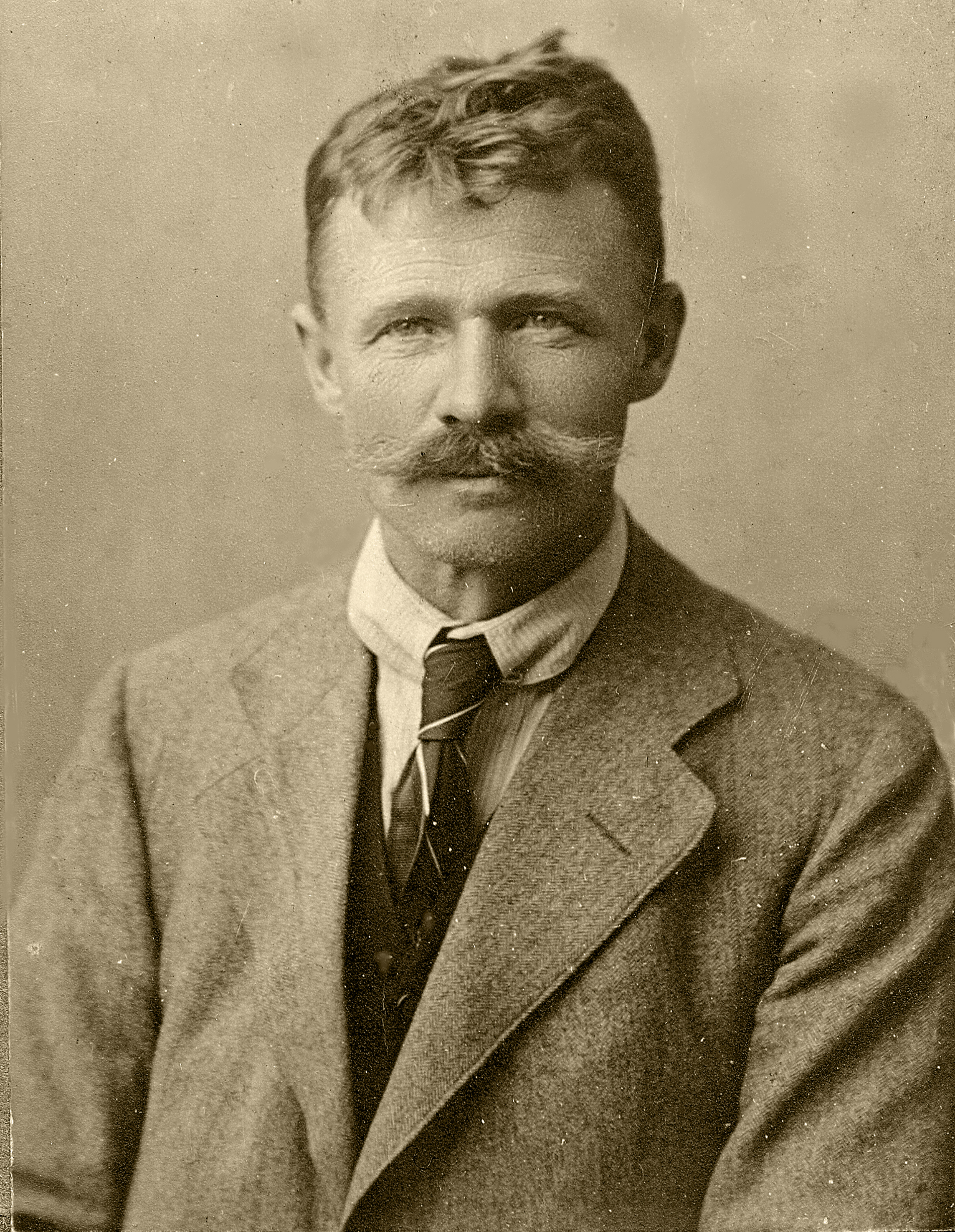 Martin Albrecht sen. Gründer der Tiroler Steinölwerke Albrecht Gmbh & Co KG im Jahre 1902 in Pertisau am Achensee